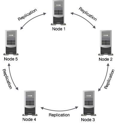 Монгол: asd